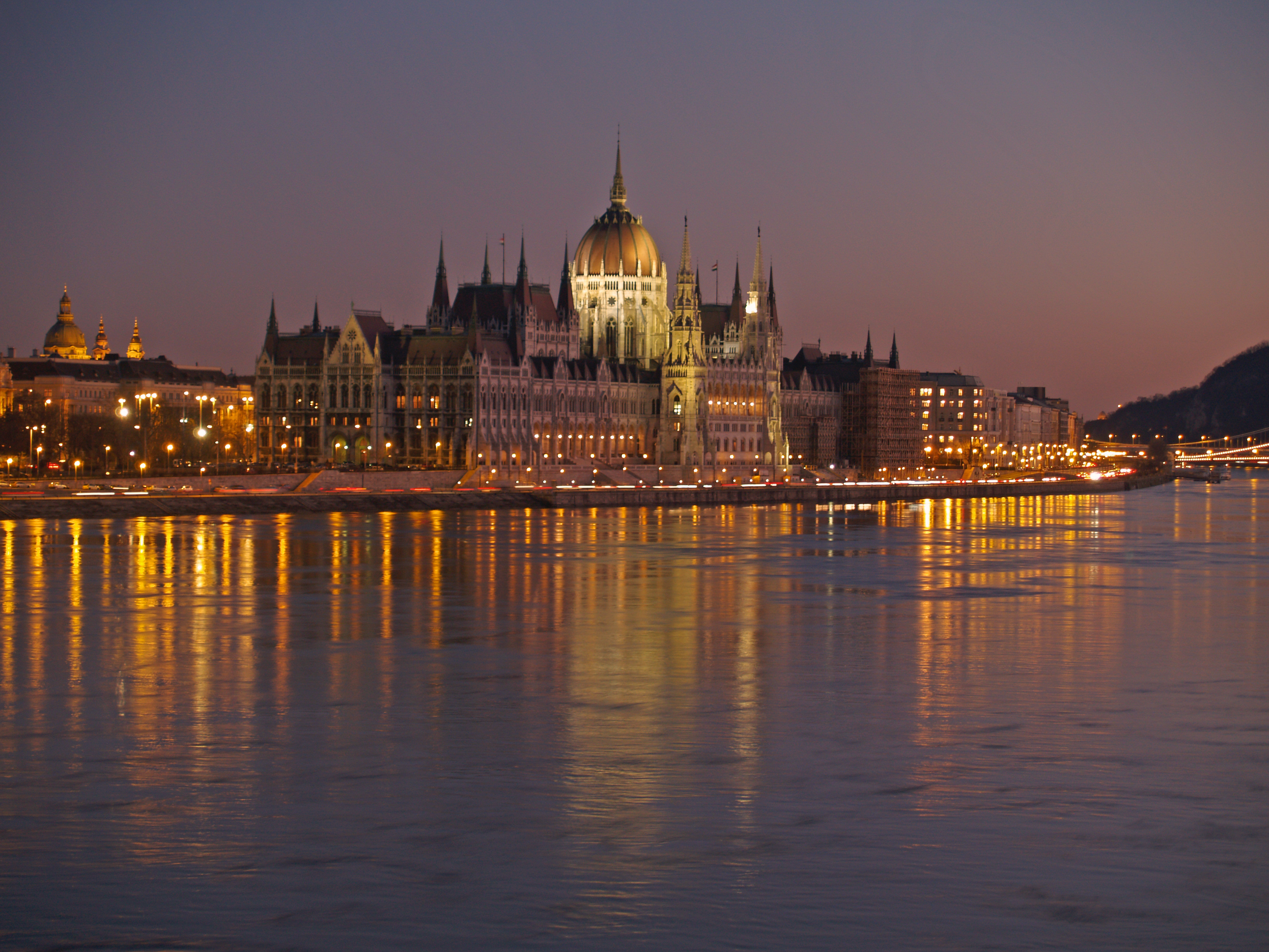 Parlement van Boedapest gelegen aan de Donau